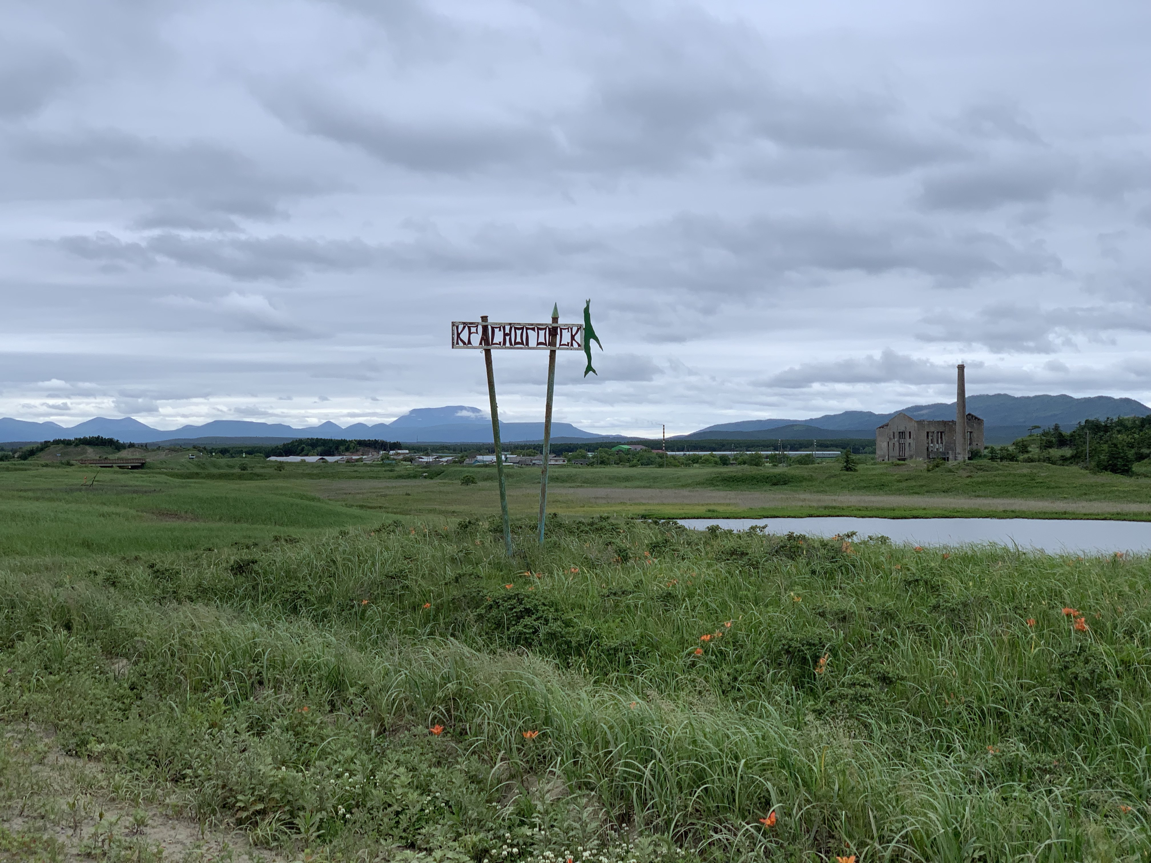 Въезд в Красногорск